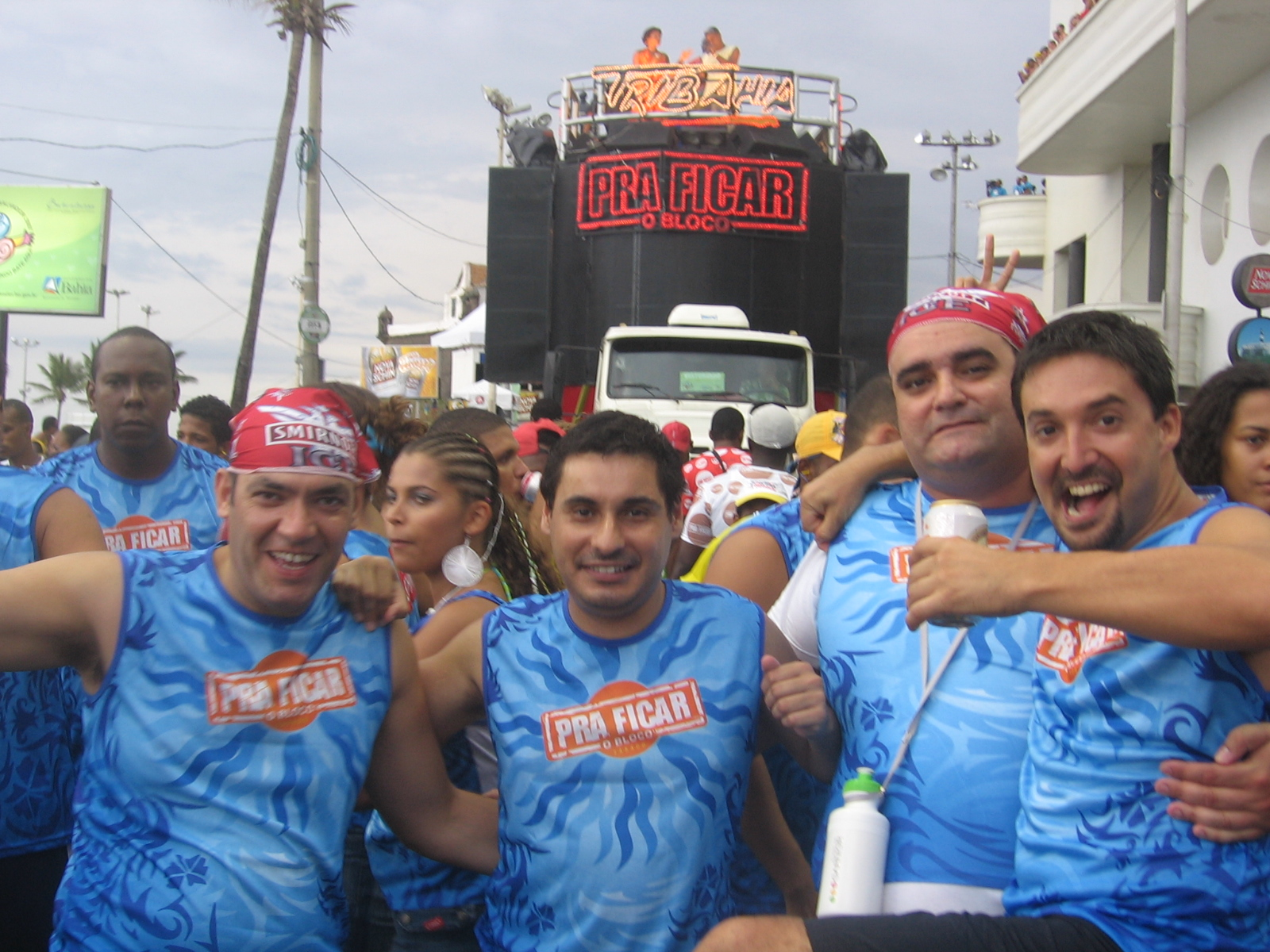 Bloco PraFicar